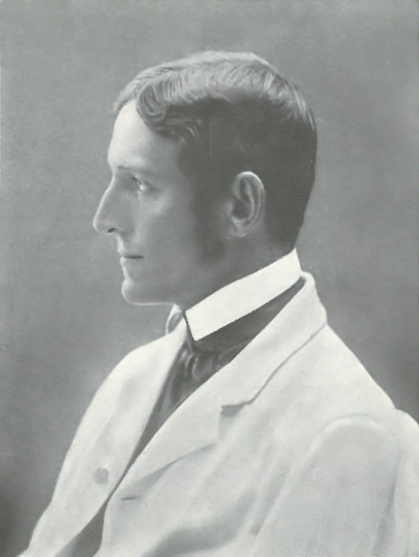 Fotografi af digteren Carl Hjernø (1871-1913)